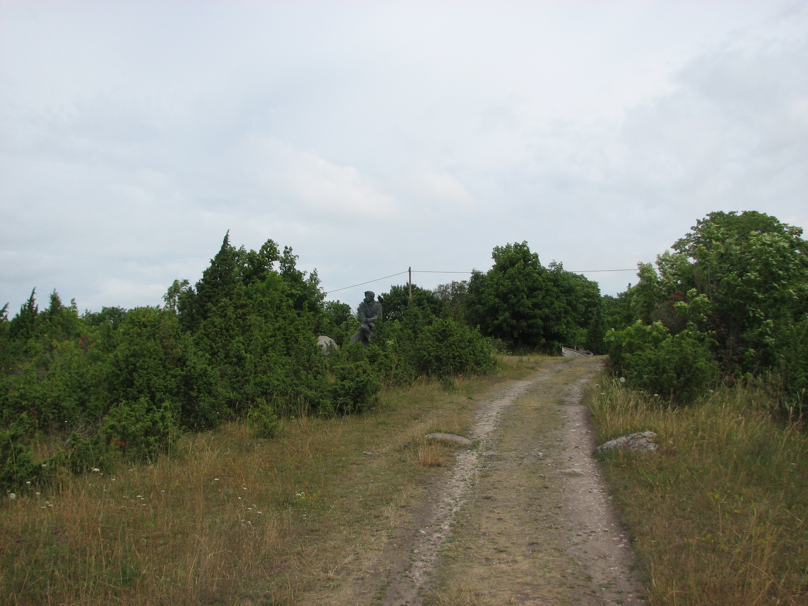 Juhan Smuuli monument Muhu saarel.